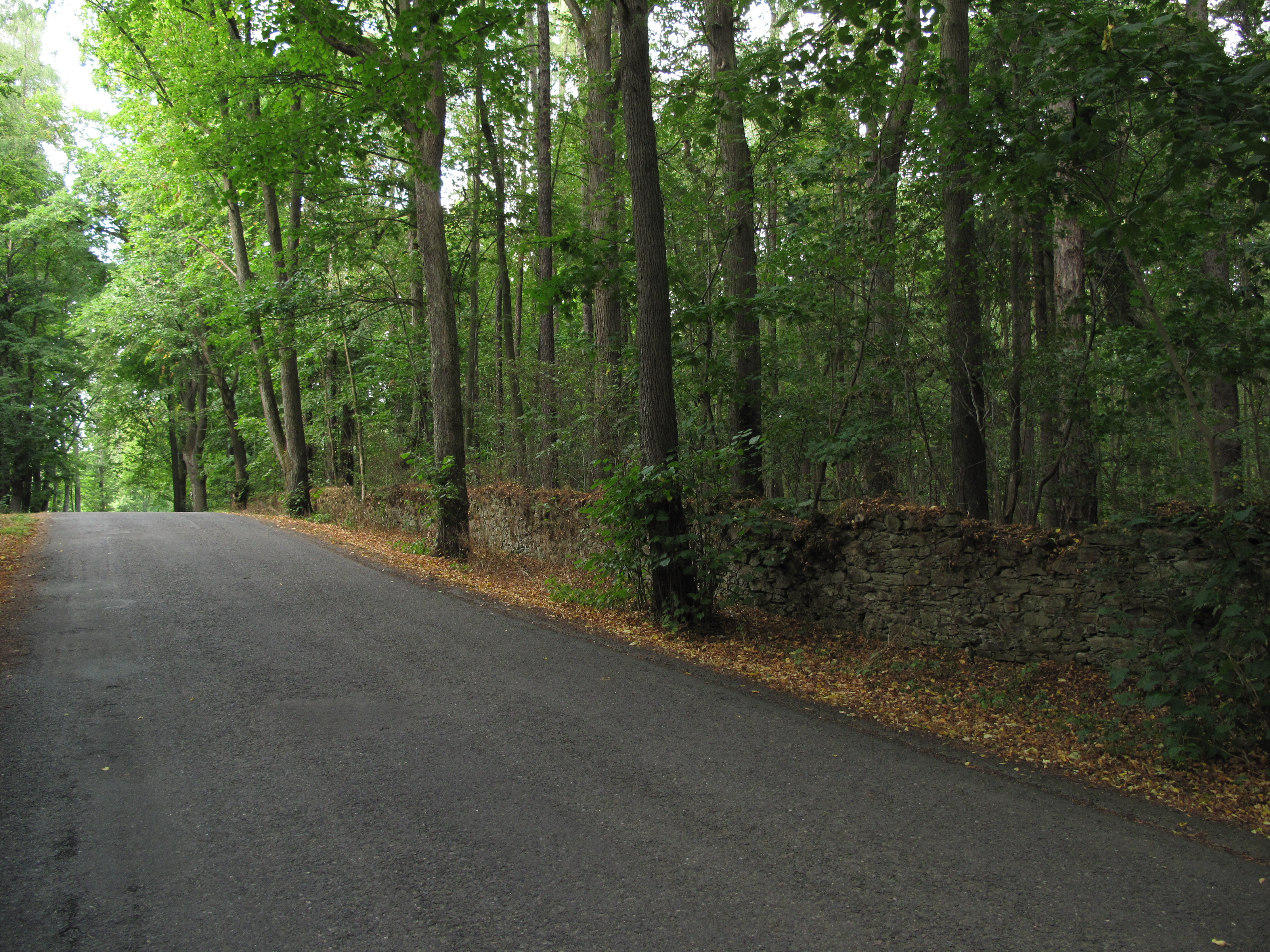 Přírodní památka Chudenická bažantnice. Okres Klatovy, Česká republika.